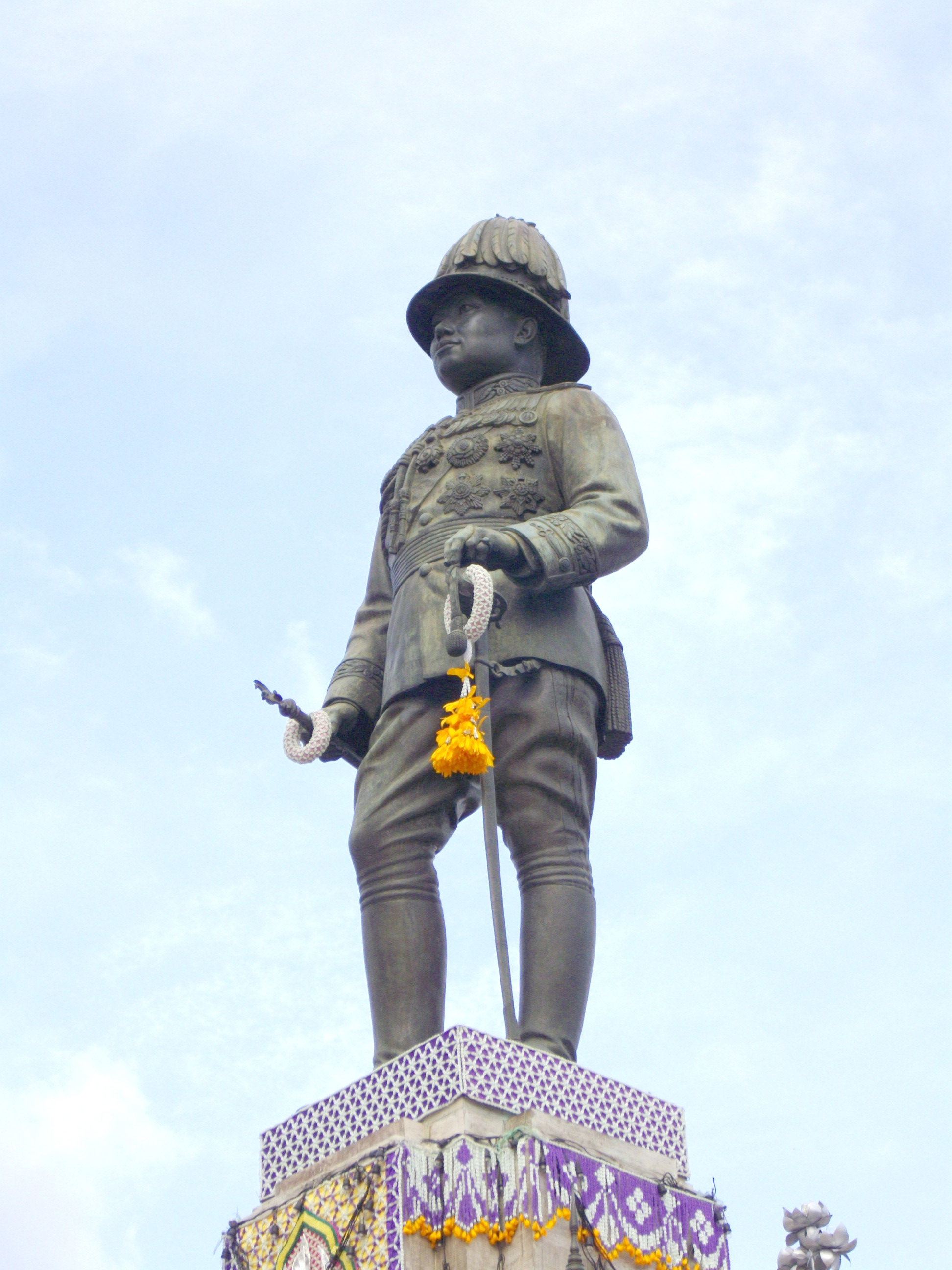 Monument of HM King Vajiravudh (Rama VI) of Siam at Lumphini Park, Bangkok.